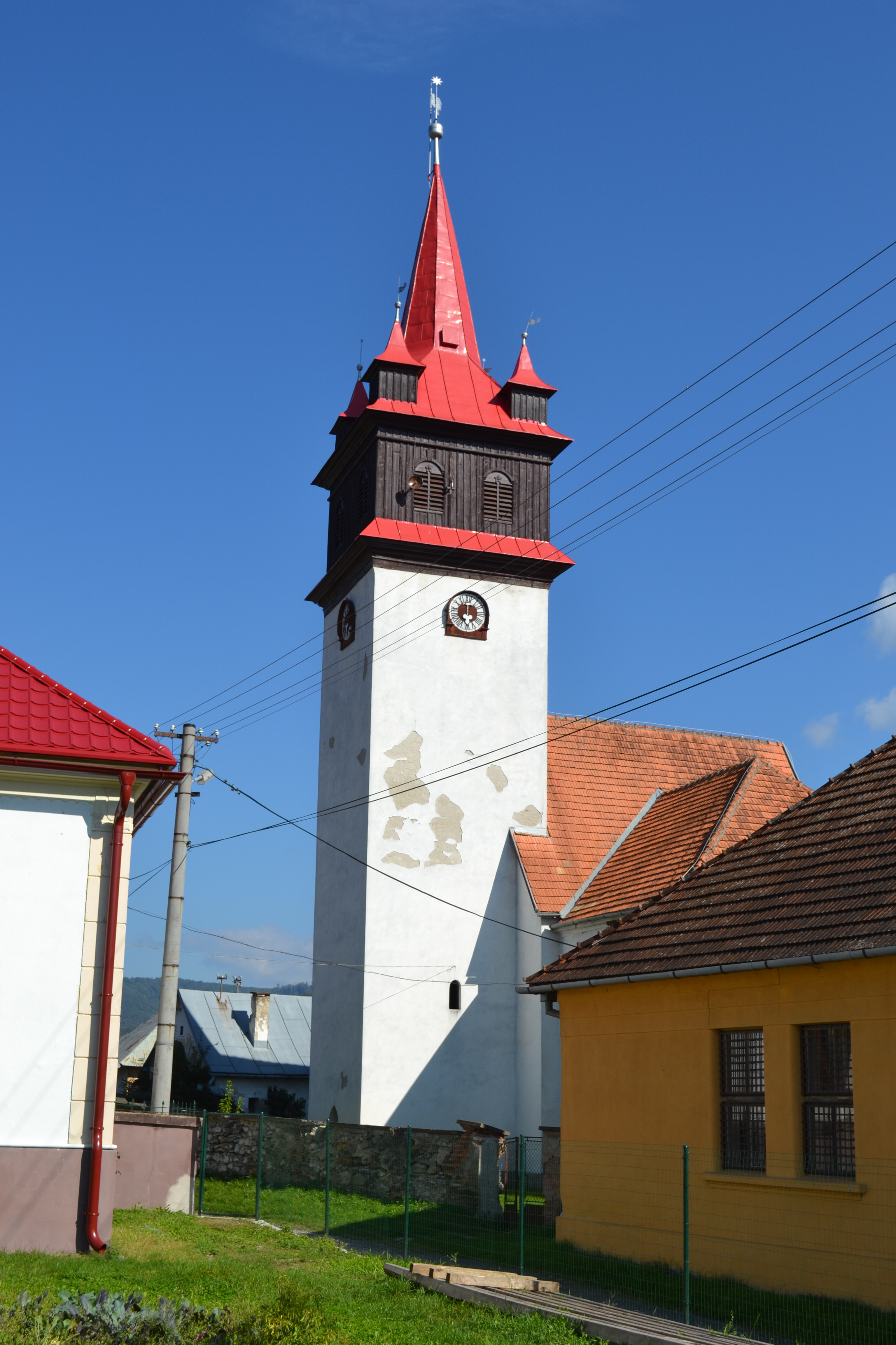 Evanjelický kostol z 13. storočia v Rimavskom Brezove